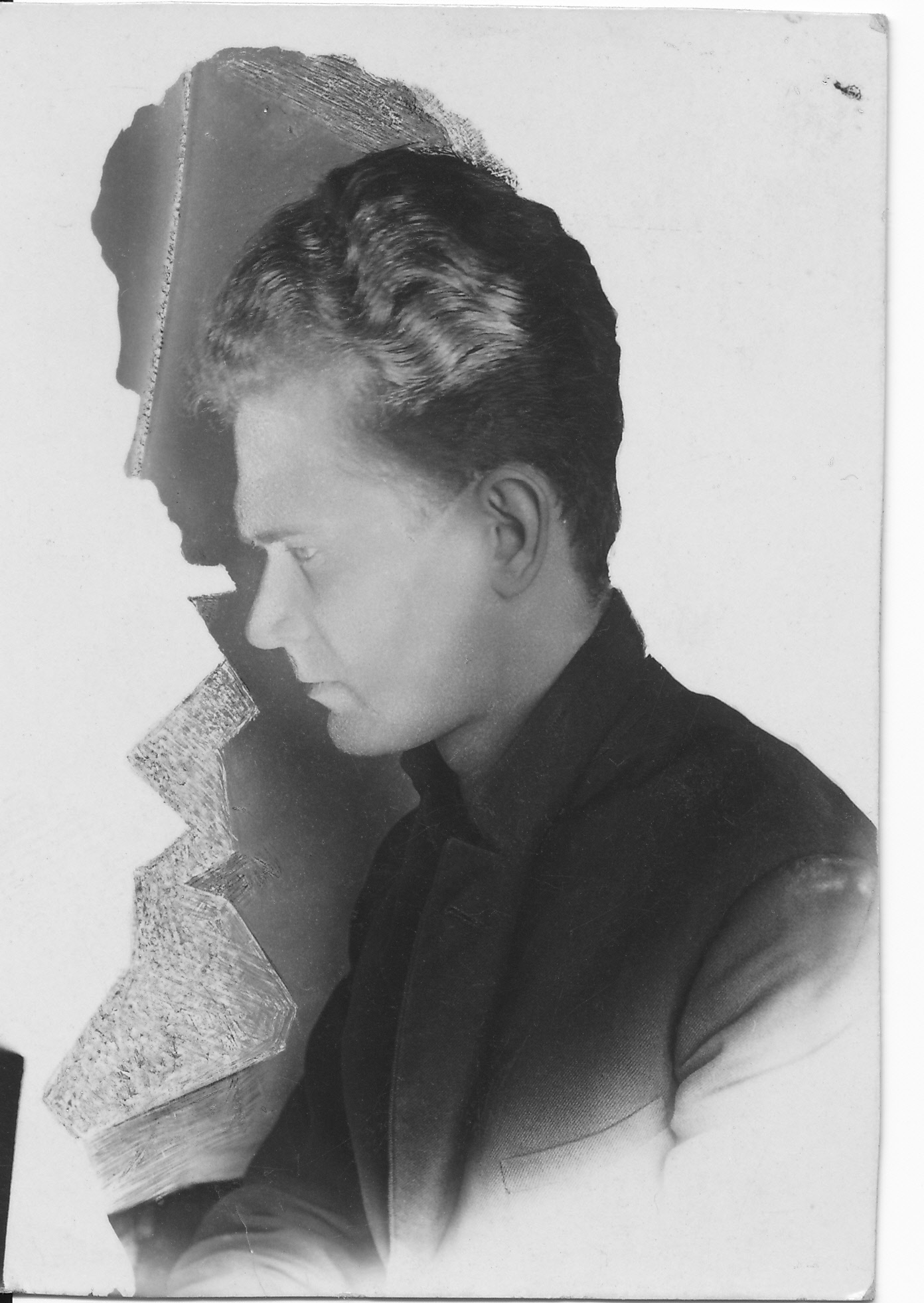 Noor Karl Taev